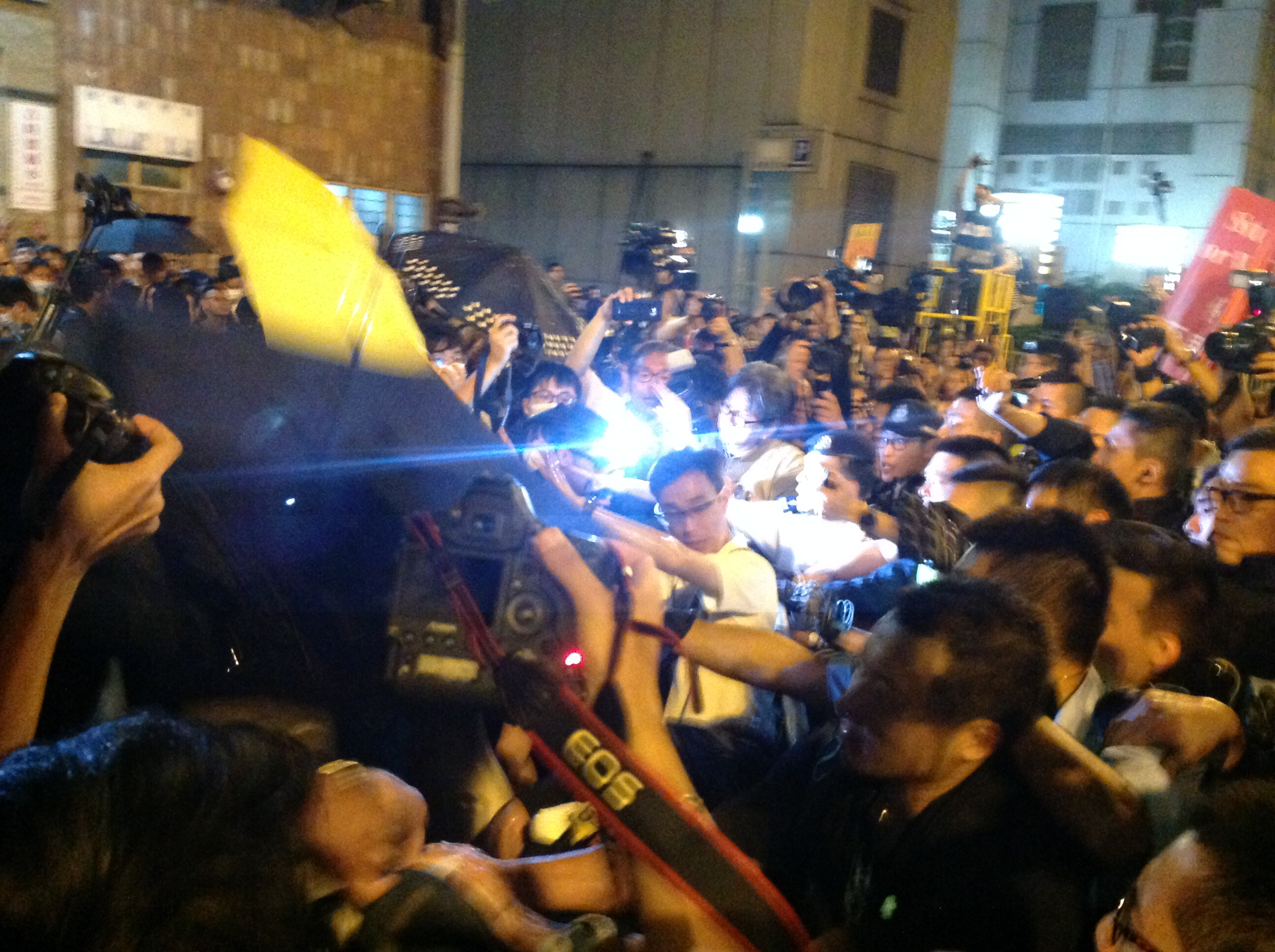 在中國人大常委會11月7日將就香港青年新政兩位議員宣誓風波，對基本法有關宣誓條例宣布釋法內容之際，香港民間人權陣線星期天發起各界“反對釋法大遊行”和集會，抗議人大在香港高等法院審理有關宣誓風波司法覆核案期間，主動對基本法第104條釋法，破壞香港獨立的司法制度。 在香港民陣發起反釋法大遊行後，數以千計的示威者繼續遊行到西環的中聯辦抗議人大釋法。8點半左右，示威者手舉雨傘再次沖擊警方防線，警方則狂噴辣椒噴劑還擊。警方調派大批警員增援，並將配備防暴頭盔的警員派至一線與示威者對峙。警方不斷呼籲示威者保持冷靜，不要衝擊警方防線，要求示威者盡快離開。 9點前，在中聯辦外與警察對峙的示威者突然撤離，輕往西區警署外的徳輔道西和西邊街道口，現場雙向交通中斷，一場自2014年雨傘運動後的佔領行動在醞釀中，現場至少有幾千之。十多分鐘後，警方開始廣​​播，要求佔路人士離開。 示威者在9點過後佔據了中聯辦外一段德輔道，並在中聯辦後門外與警方防線展開推撞，警方用辣椒噴霧還擊將示威者防線推後。示威者不斷呼喊反對釋法。 警方在中聯辦西邊的朝光街路口佈署第二道防線，並有警員從路旁的西區警署裡向警察傳遞防暴盾牌進一步部署防線。目前還不清楚警方何時清場。